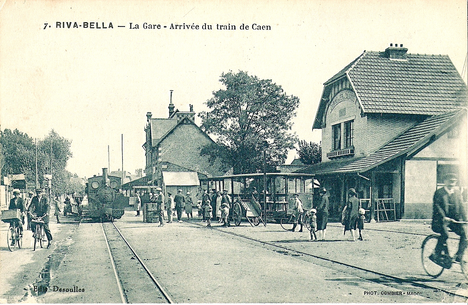 Carte postale ancienne éditée par DesoullesRiva-Bella (Ouistreham) - La Gare - Arrivée du train de Caen